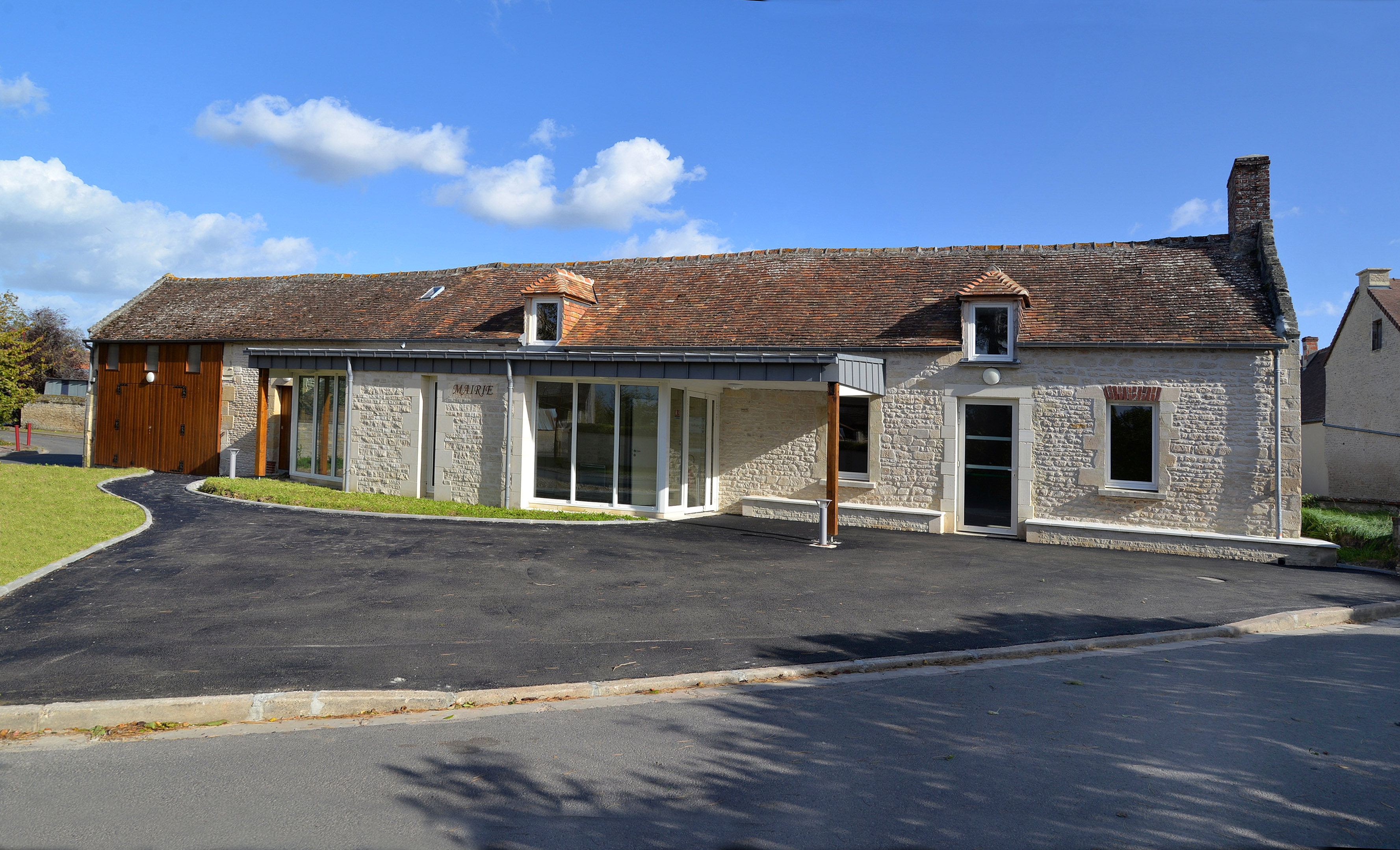 Mairie de Conteville (Calvados)